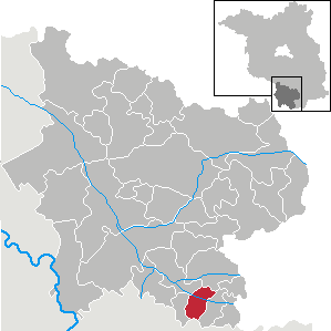 Gröden in Brandenburg (Country) - District Elbe-Elster